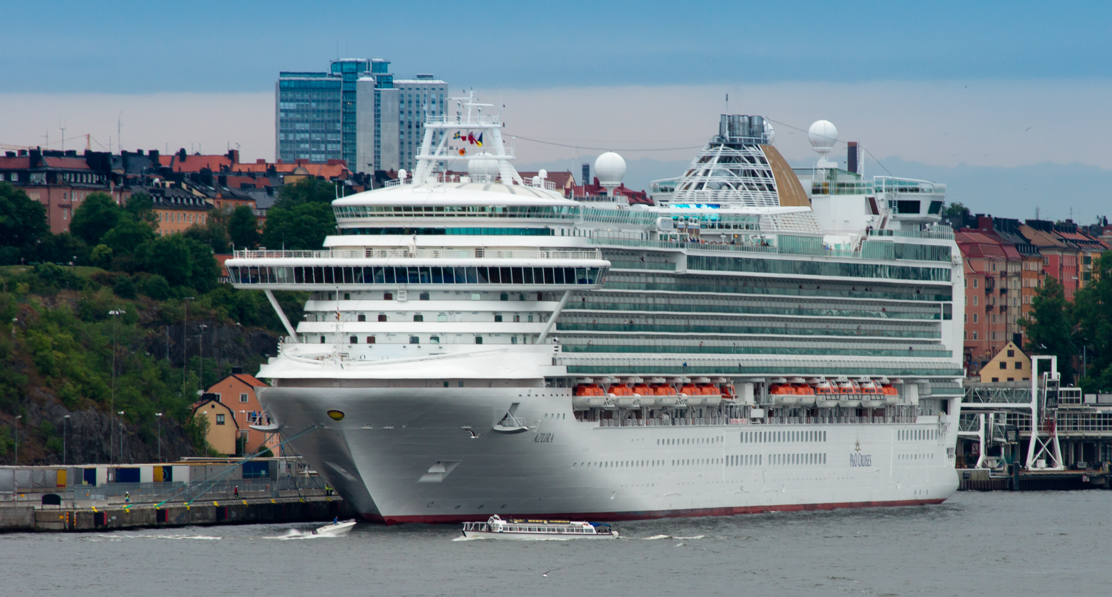 L'Azura dans le port de Stockholm